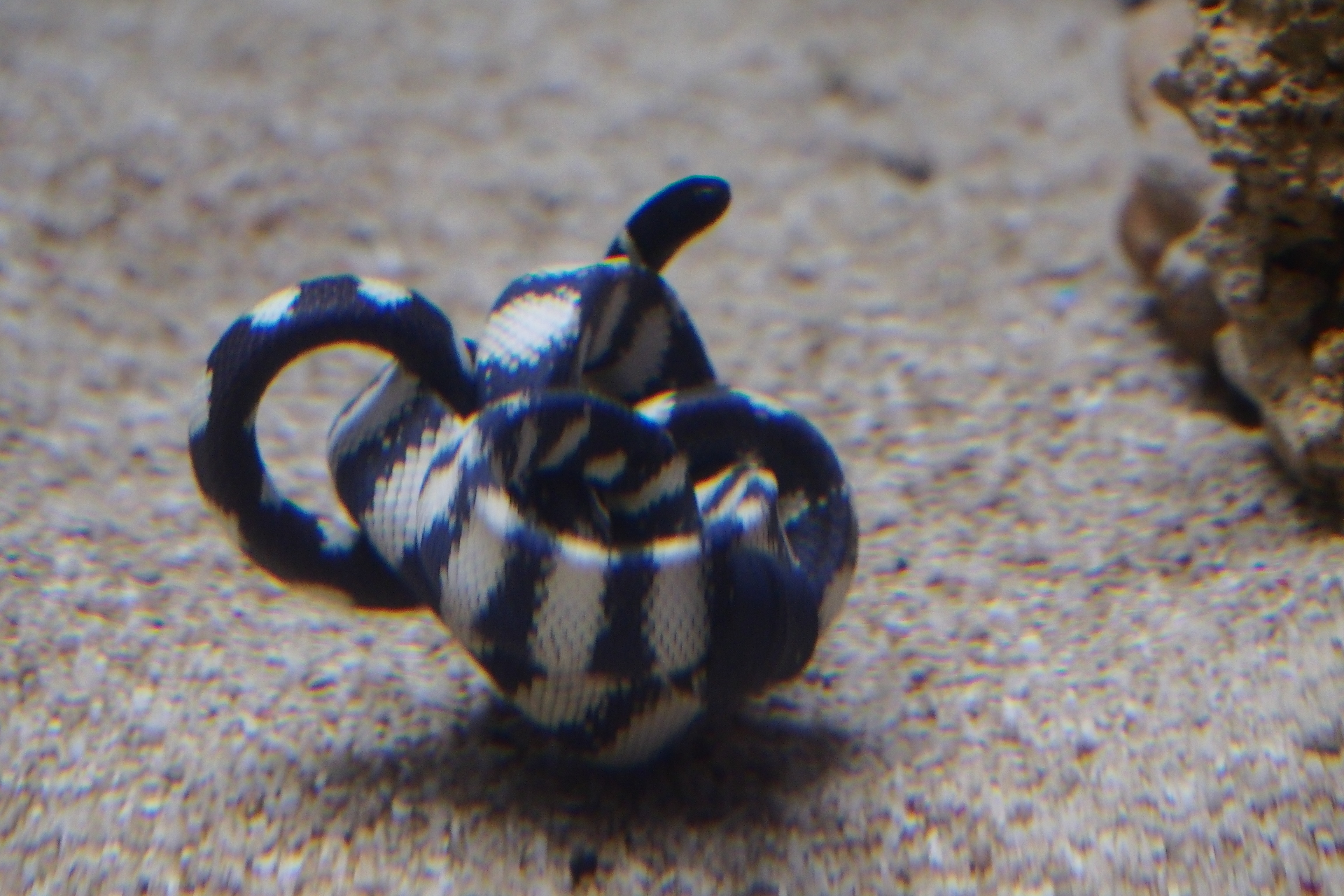 クロガシラウミヘビ. at Suma aquarium.